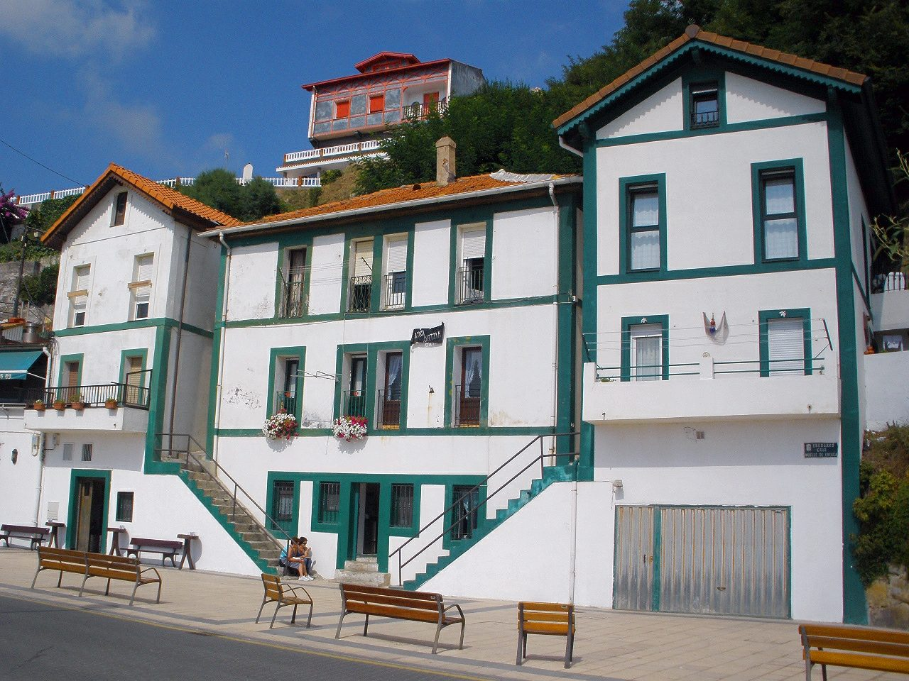 Casas de Anbekokale junto a la carretera del Puerto Viejo a Ereaga, en Algorta, Guecho (Vizcaya)